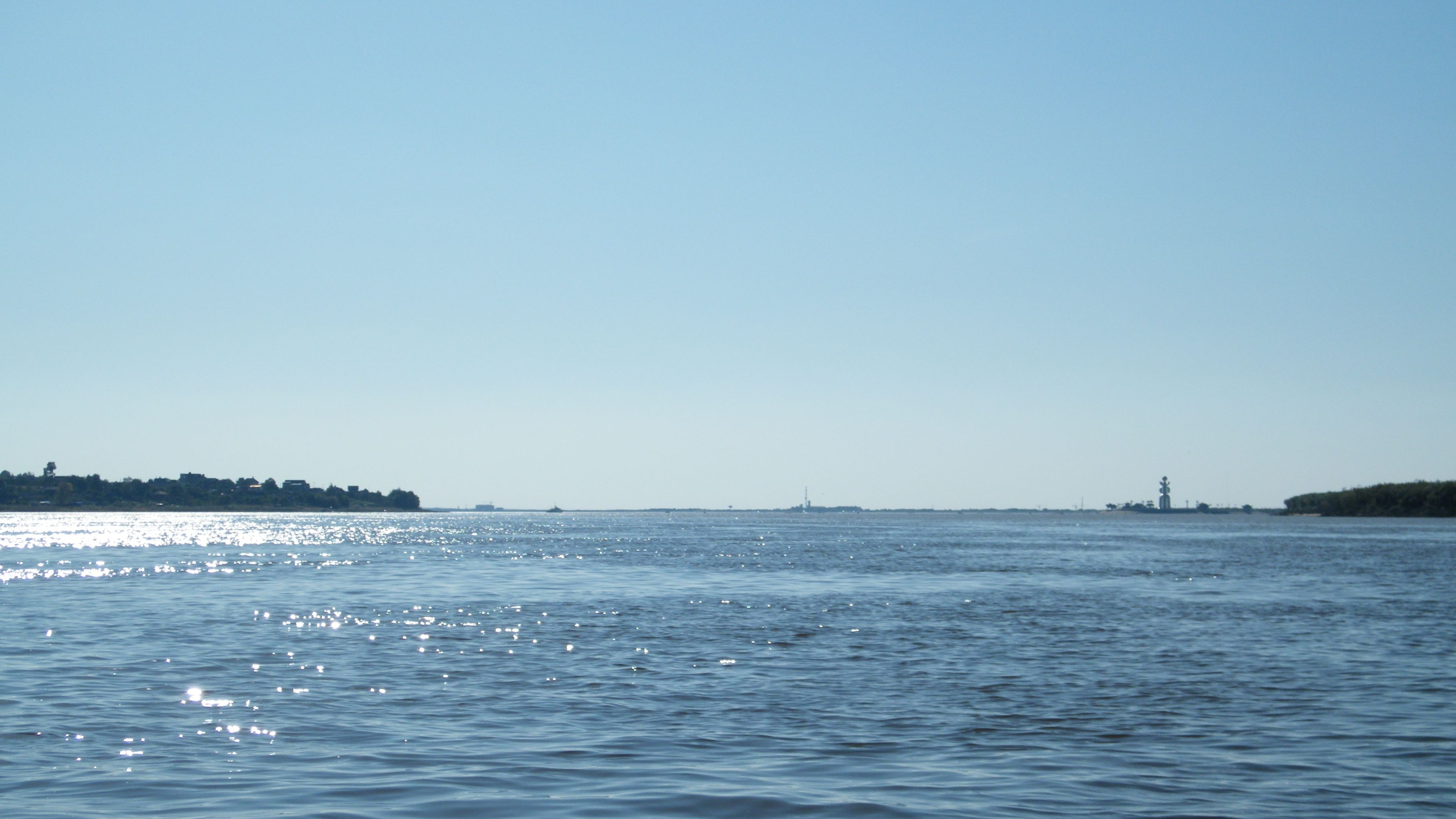 Амурская протока и село Казакевичево сент 2014